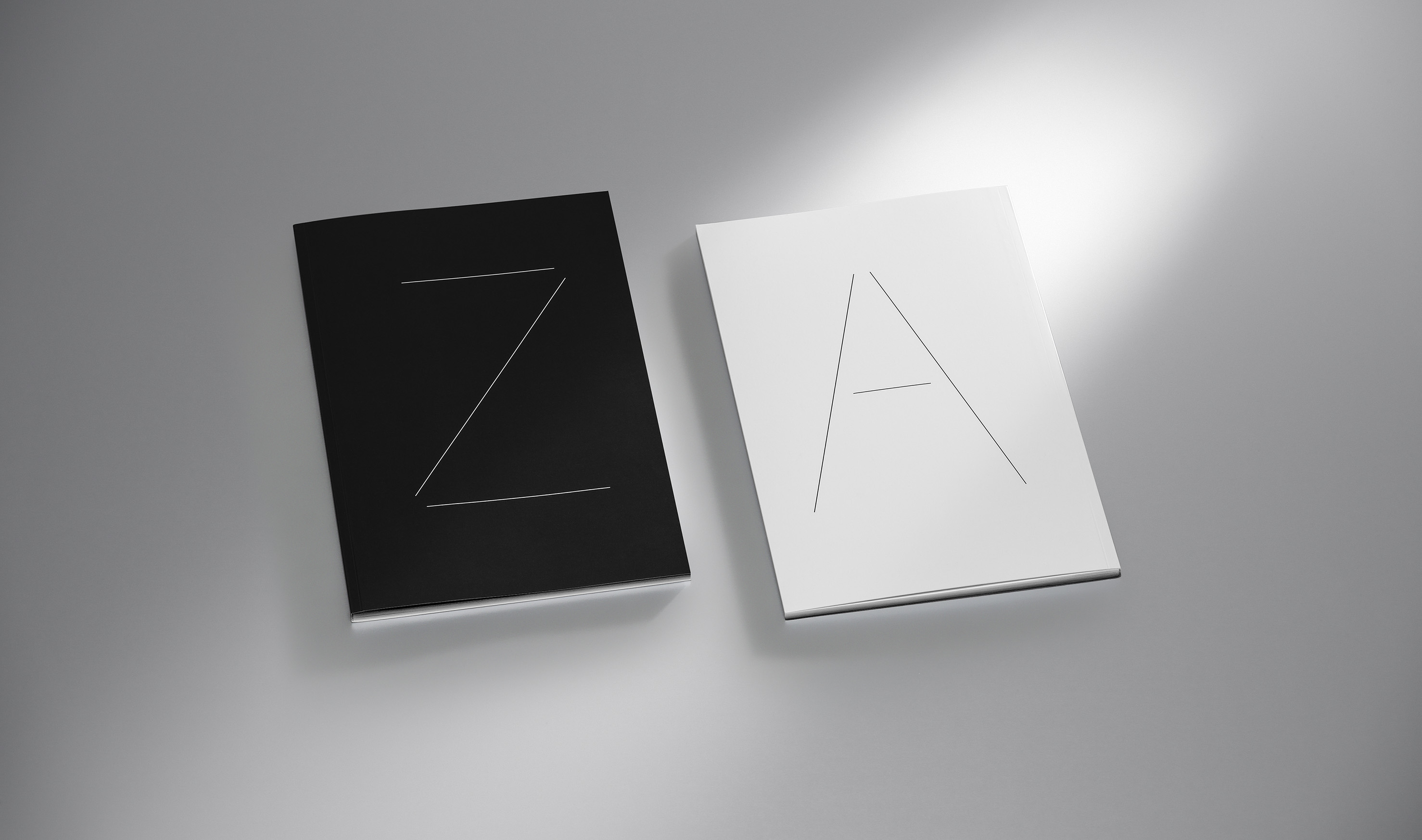 Künstlerischer Geschäftsbericht 2018/19 der Zumtobel Group - gestaltet von Dietmar Eberle